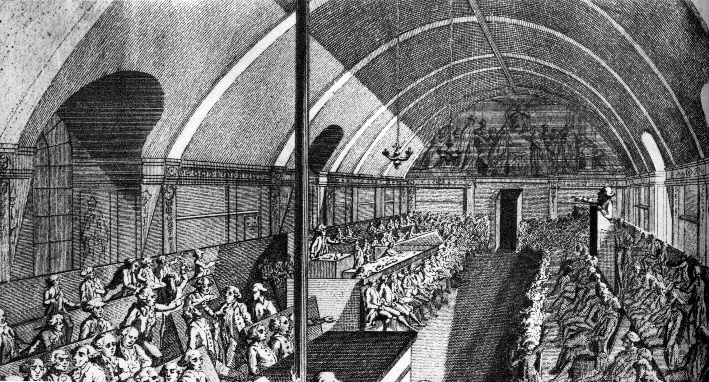 Une séance au club des Jacobins. Alexandre de Lameth préside tandis que Mirabeau prononce un discours (janvier-février 1791) - gravure d'époque